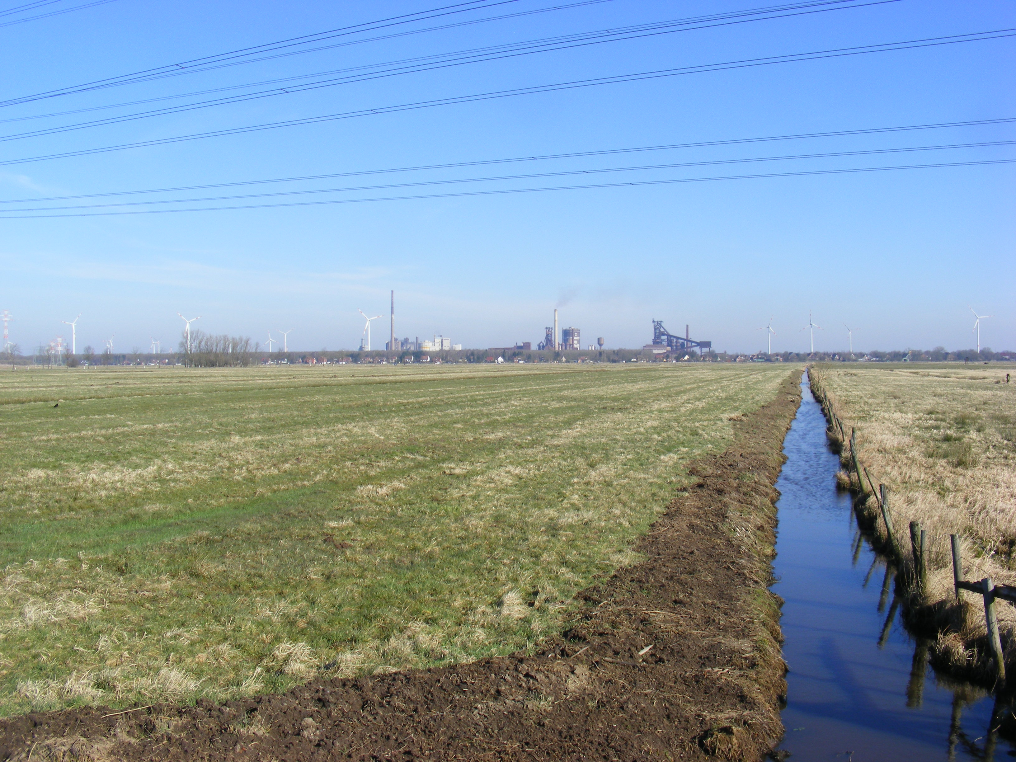 Entwässerungsgraben Hasenbürener Moorlöse, Blick vom Steertgrabenweg zum ArcelorMittal-Stahlwerk Bremen